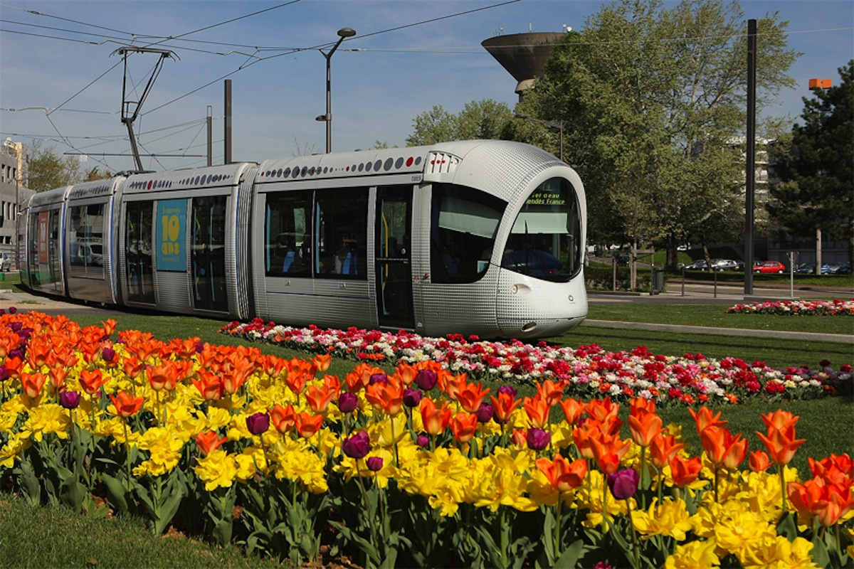 Vénissieux est l'une des très rares villes de banlieue à posséder 4 fleurs.